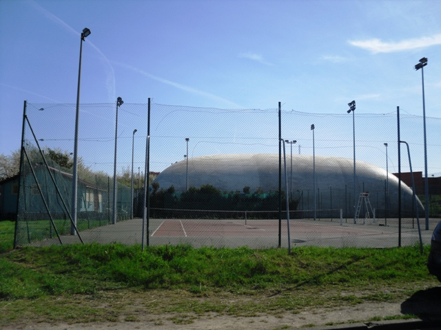 Les courts de tennis de Longpont-sur-Orge